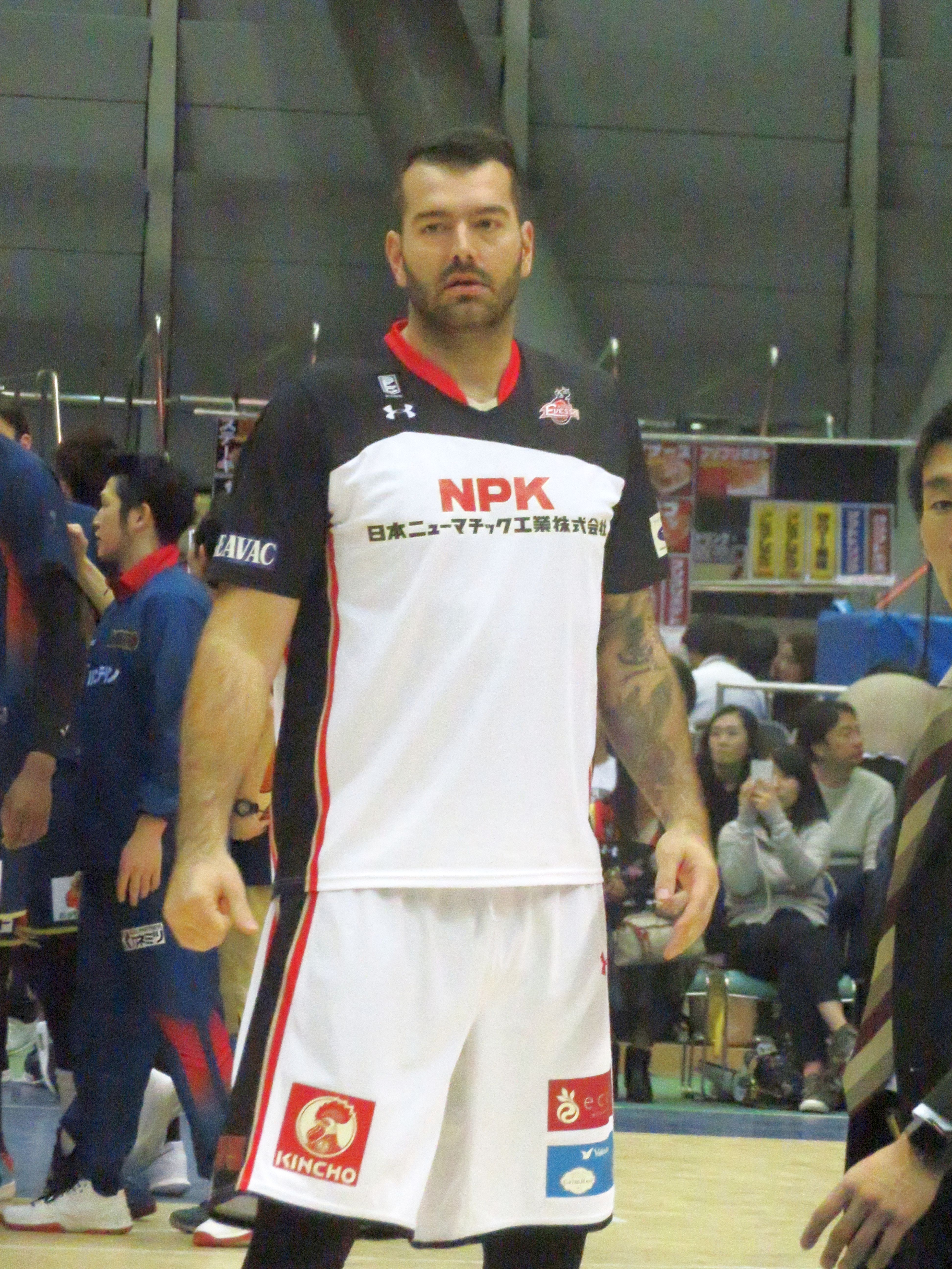 2018年12月15日 2018-19 B1 第14節 横浜-大阪 横浜国際プール